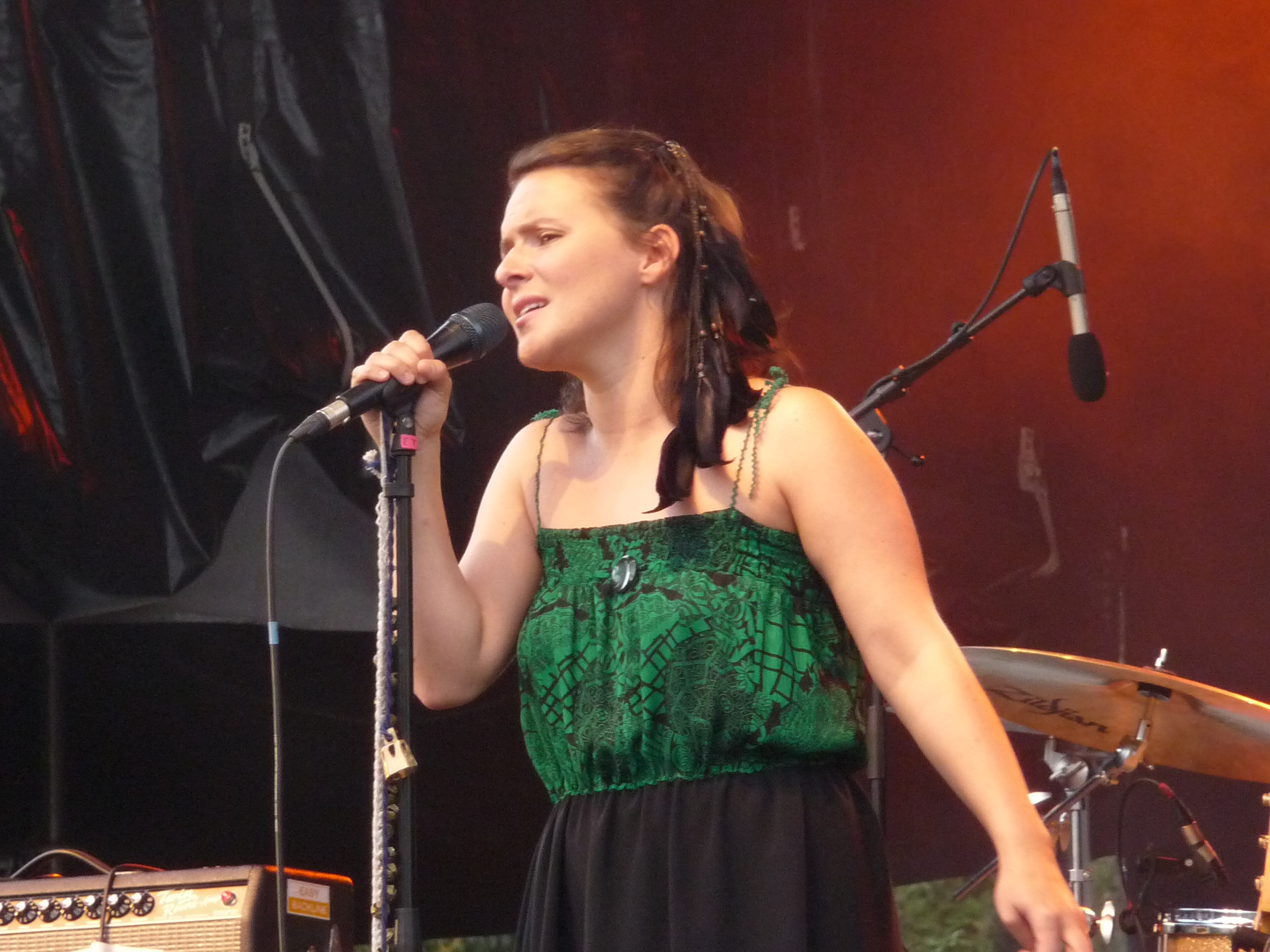 Emilíana Torrini at Furia Sound Festival 2009.